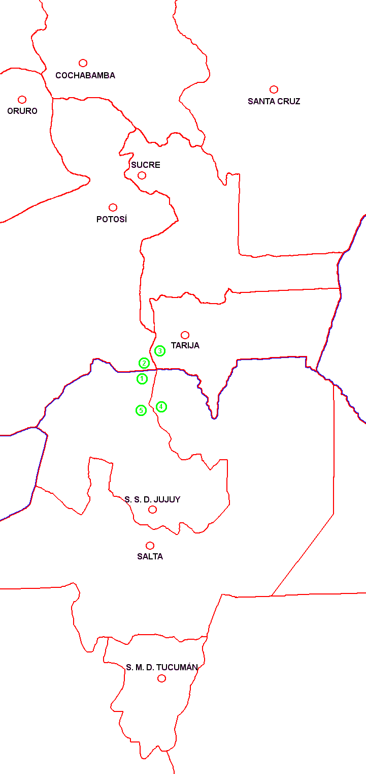 Rebutia torquata - range map